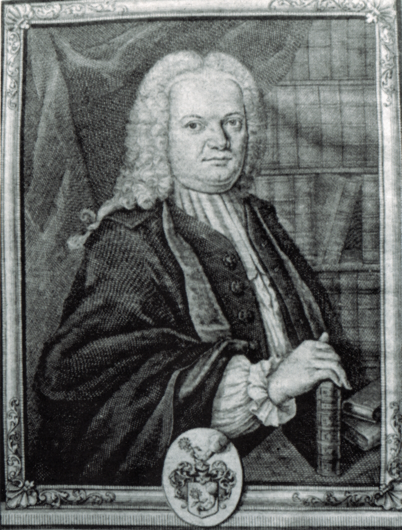 Carl Heinrich Lange (1703-1753), von 1728 bis 1739 Subrektor des Katharineums zu Lübeck